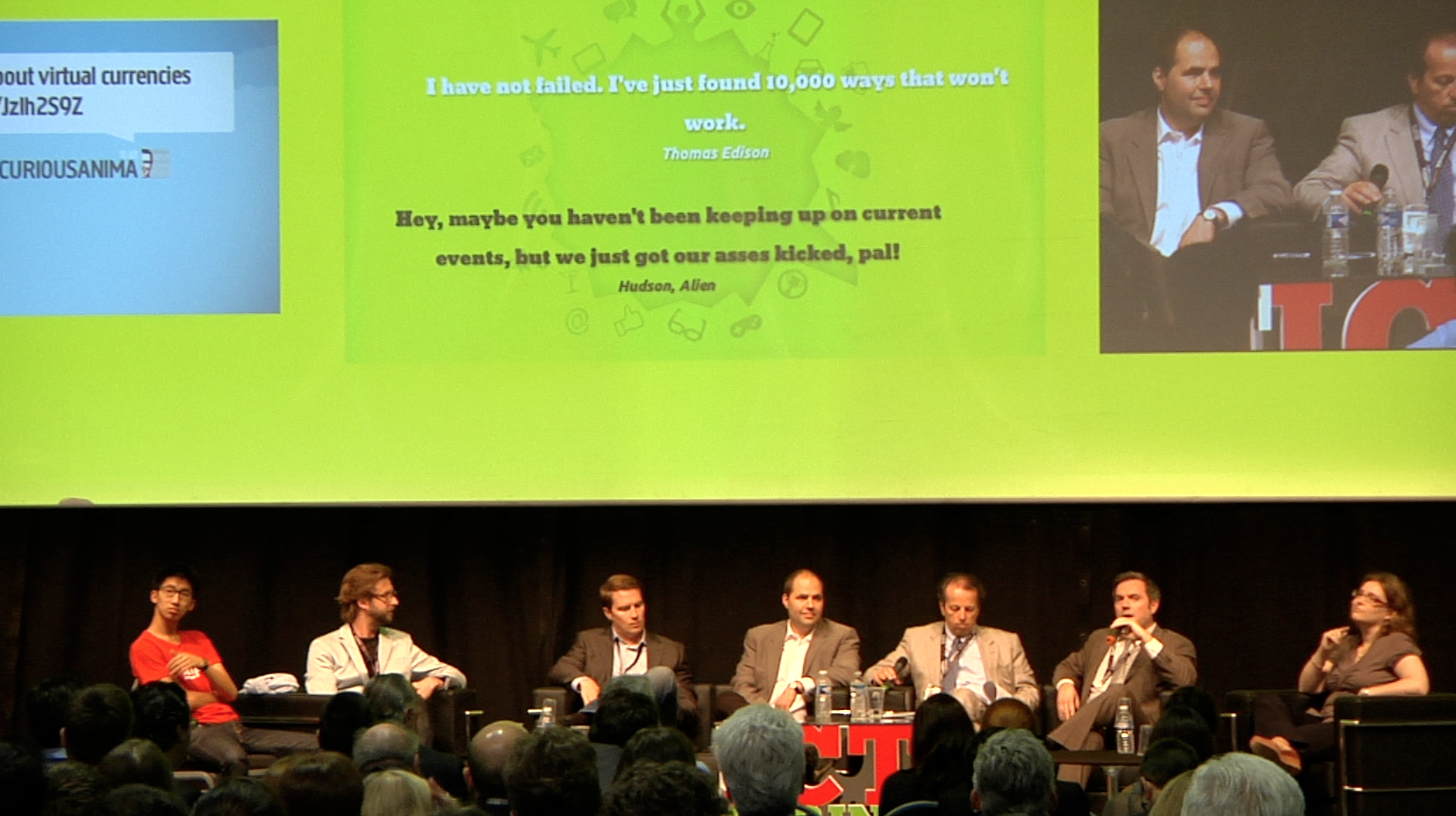 ICT SPRING 2012の会場写真